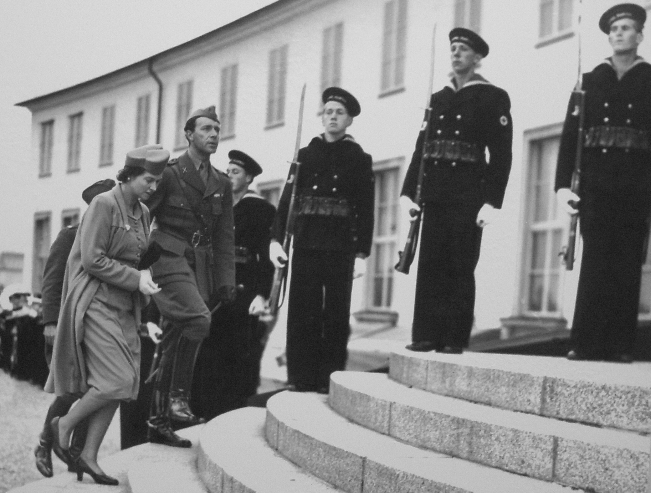 Prinsessan Sibylla och prins Gustaf Adolf anländer till utställningen "Svensk Sjömannagärning i allvarstid" på Sjöhistoriska museet i Stockholm, den 21 september 1940.